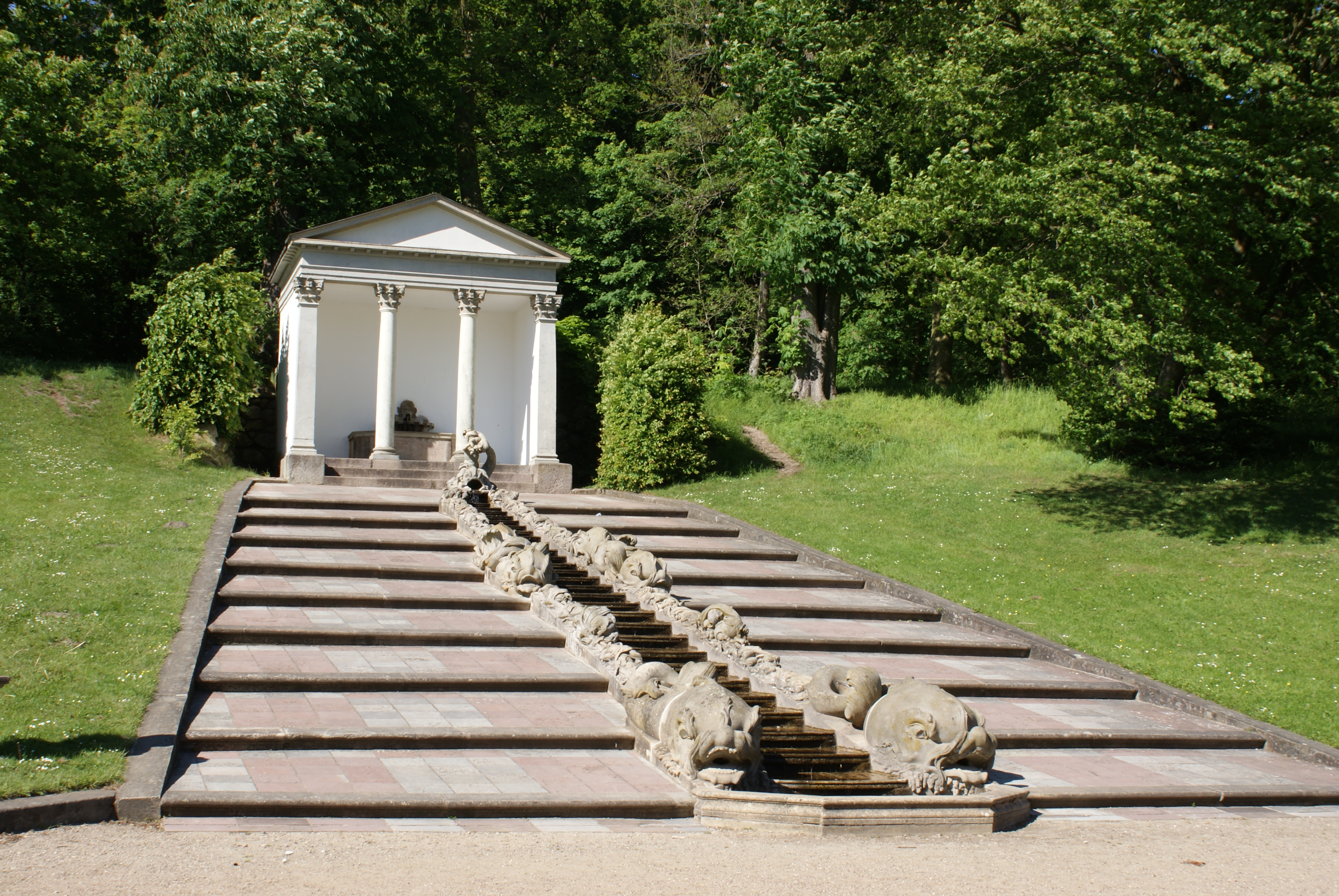 Description=Gottorf, Tempel im Fürstengarten Source=myself Date=02.2007 Author=PodracerHH 20:39, 1 March 2007 (UTC)